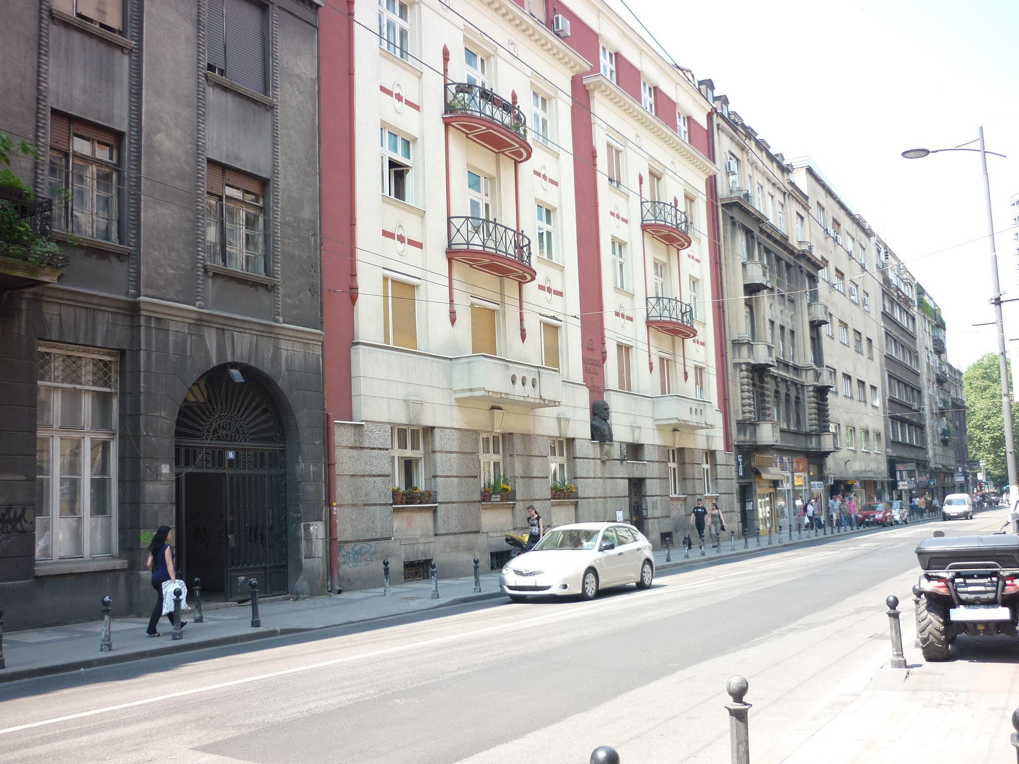 Zaduzbina Vlajka Kalenića